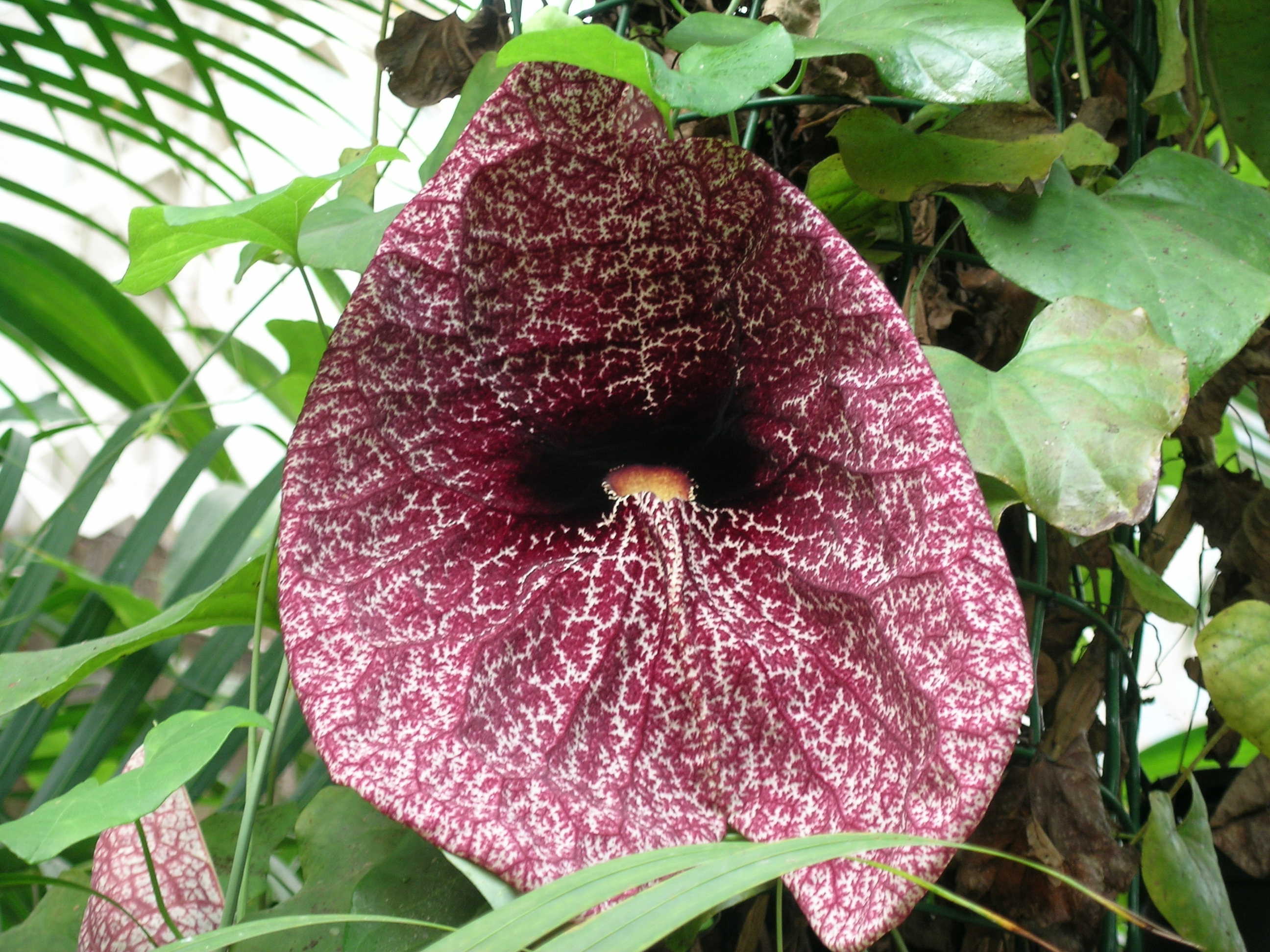 Planta cuasi carnívora. Atrapa insectos durante un tiempo para facilitar polinización y posteriormente los libera.